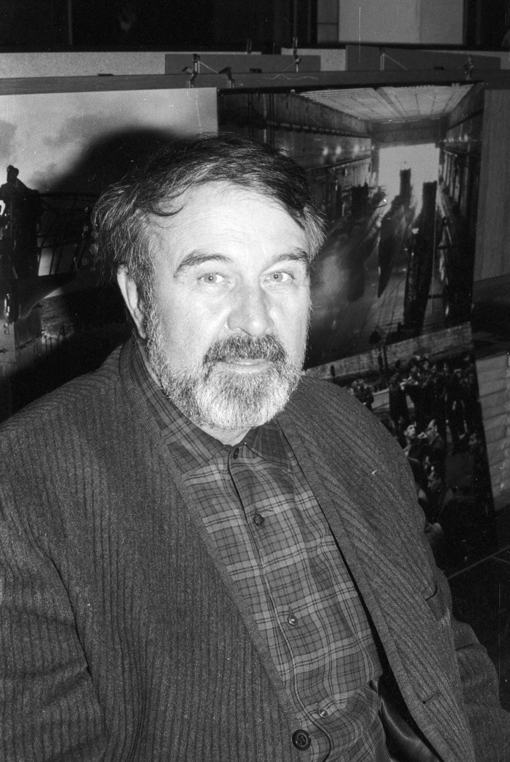 ist am 04.11.1976 zu einer Signierstunde in der Buchhandlung Erichsen & Niehrenheim in der Dänischen Straße 8-10.